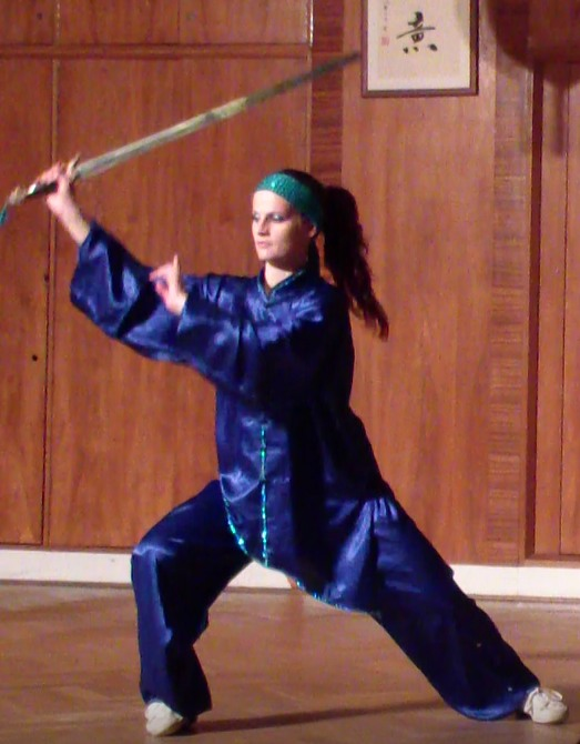 Martina Slabá (* 1991, Praha) česká závodnicí v taiji, která přivezla první místo z čínské soutěže v taiji v Jiao Zuo (2009); roku 2011, 2013 a 2014 se stala mistryní Evropy. Je mnohonásobnou mistryní České republiky v taiji (v letech 2006 - 2014) a pravidelně obsazuje medailové pozice na mezinárodních soutěžích konaných nejen v tuzemsku ale i v dalších evropských zemích (Czech Open, Slovakia Open, Poland Open). Sestava s mečem, Taiji Akademie Praha - Vinohrady, 2012.